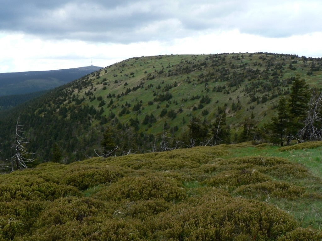 Jelení hřbet (Hrubý Jeseník), pohled z Břidličné